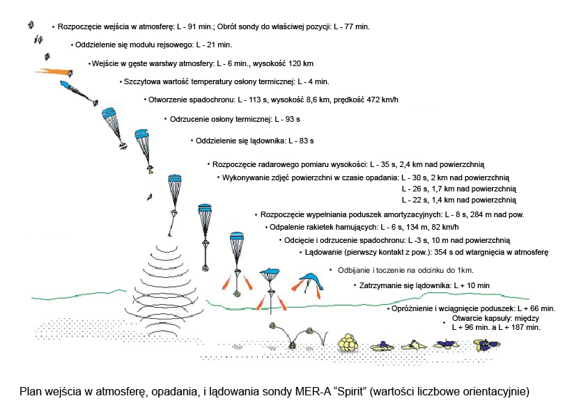 Schematyczna sekwencja lądowań sond MER. Na podstawie rysunku NASA.